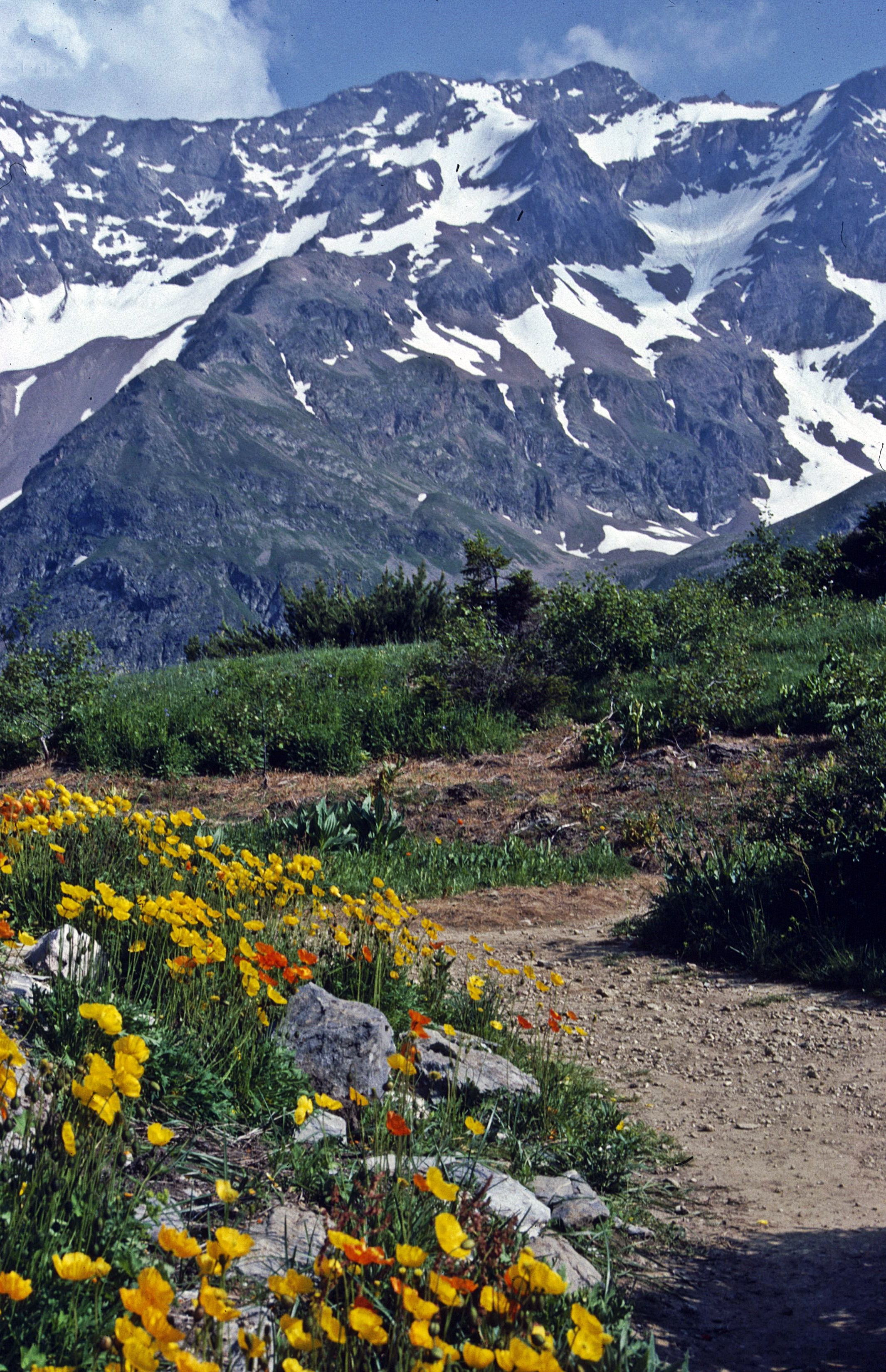 Alpingarten auf dem Col du Lautaret